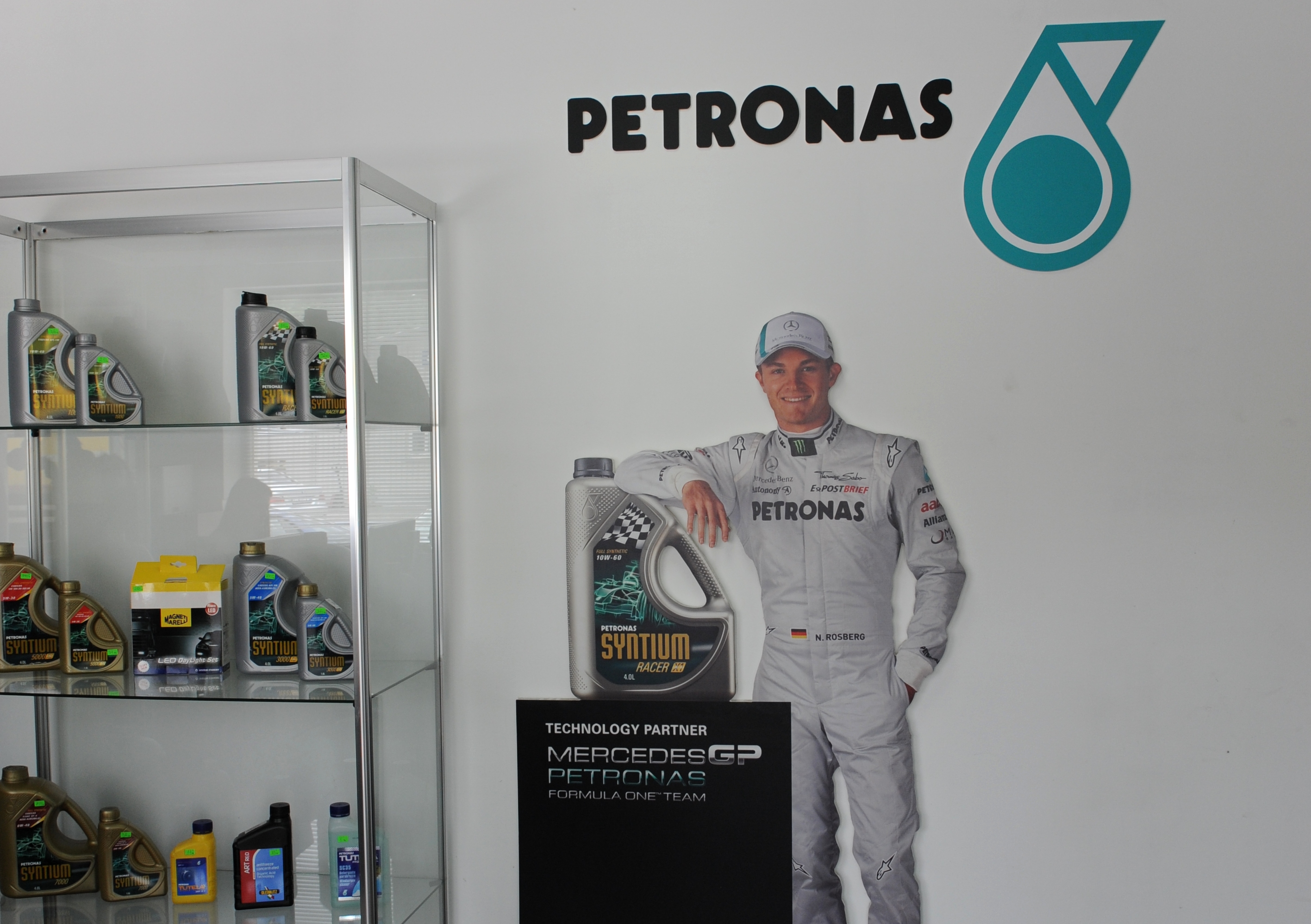 Фигура на Нико Росберг в реален размер рекламира Петронас Синтиум в сервизите на вносителя на маслата за България - Ратола Корпорация.